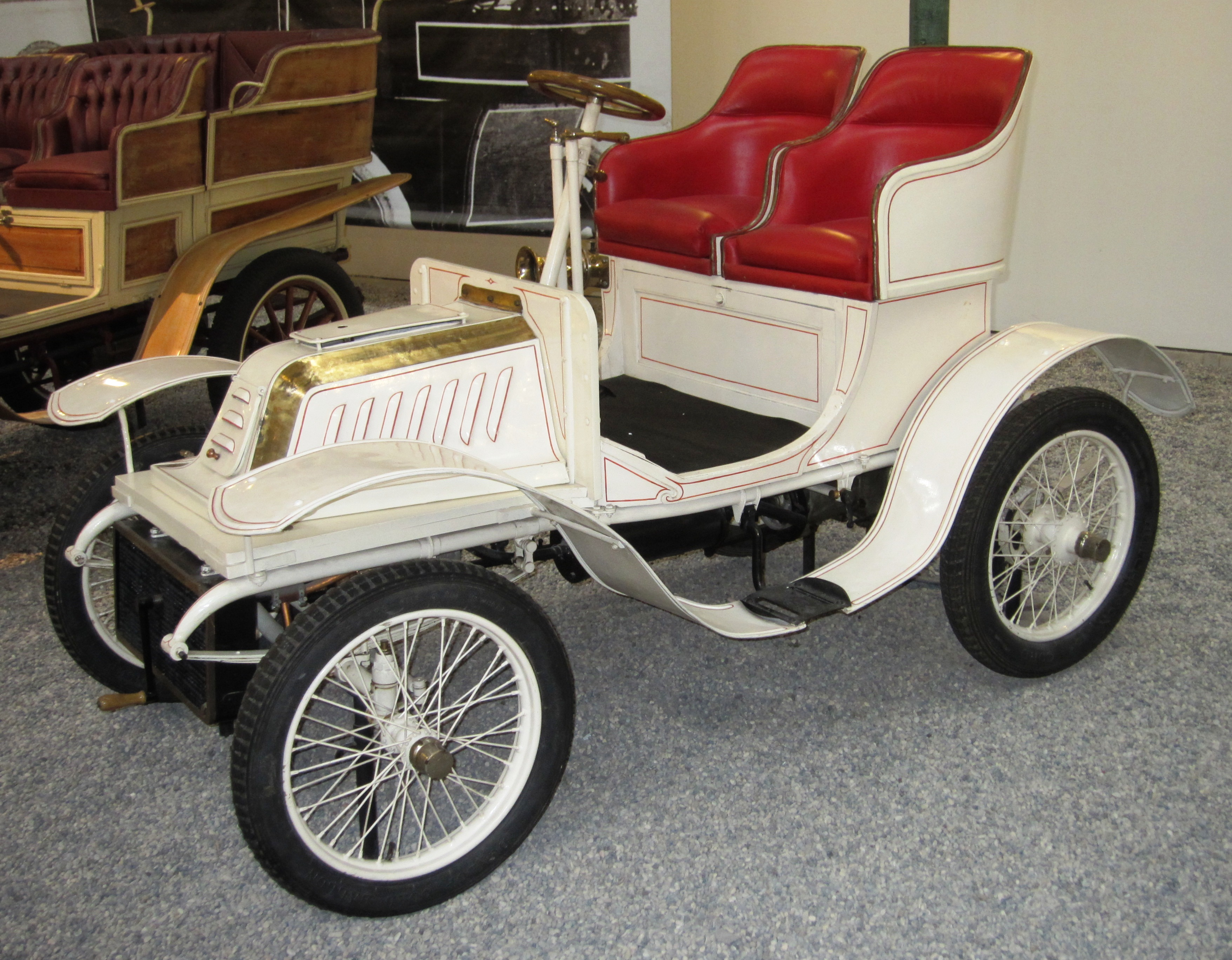 De Dion Bouton Populaire Type J Tonneau 1902 942cc (8CV)